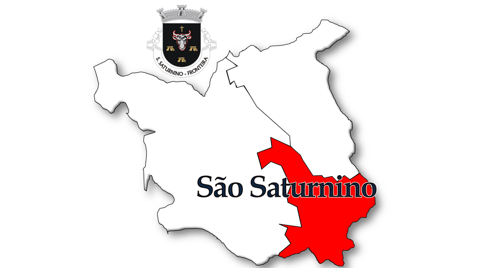 Evolução da População